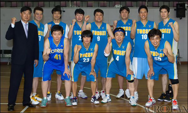 Again 1995! 농구 고연전(연고전) 미디어 데이